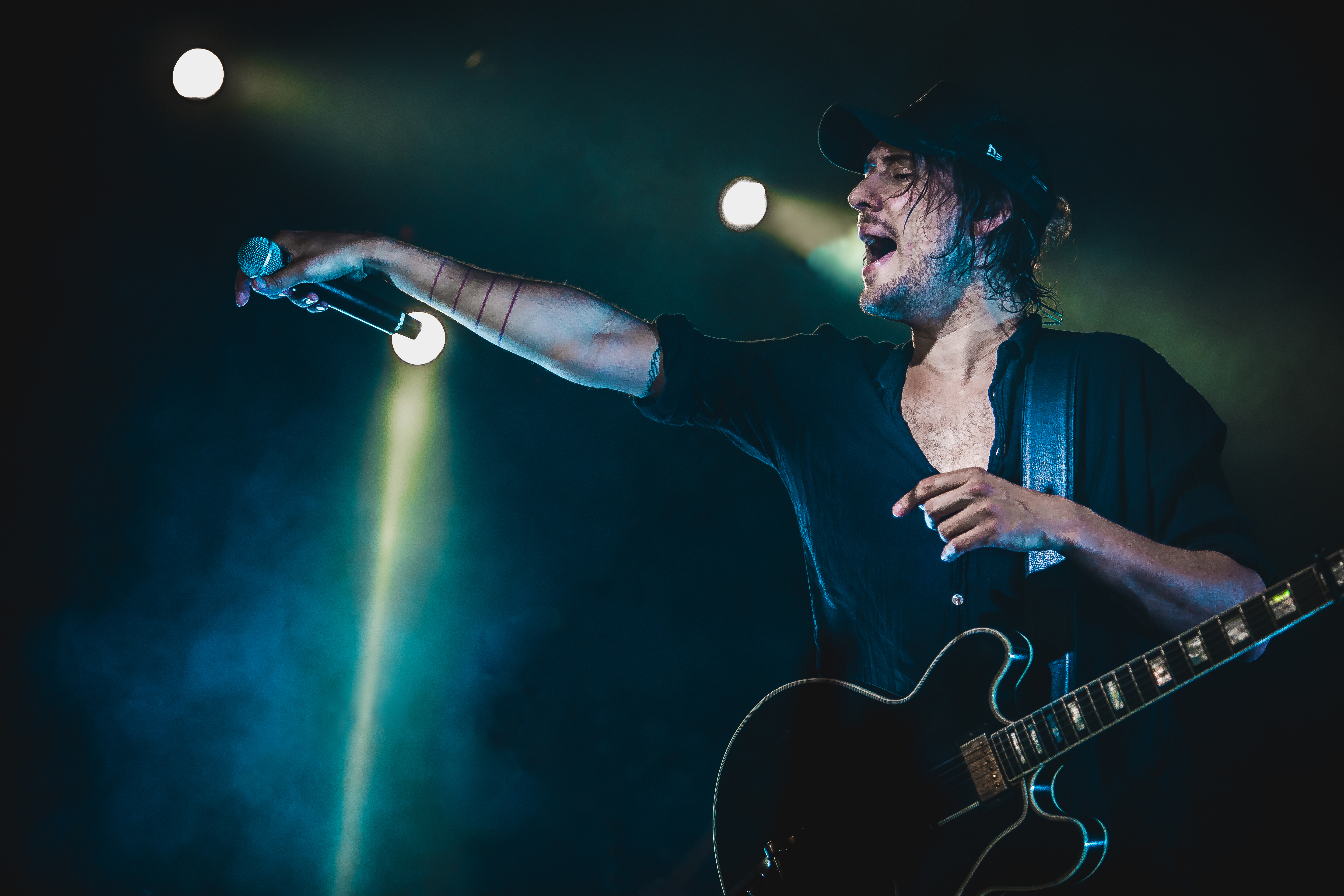 Fotografie je vyfocena v Pražském klubu Roxy při koncetu, který se konal 12. 4. 2018.